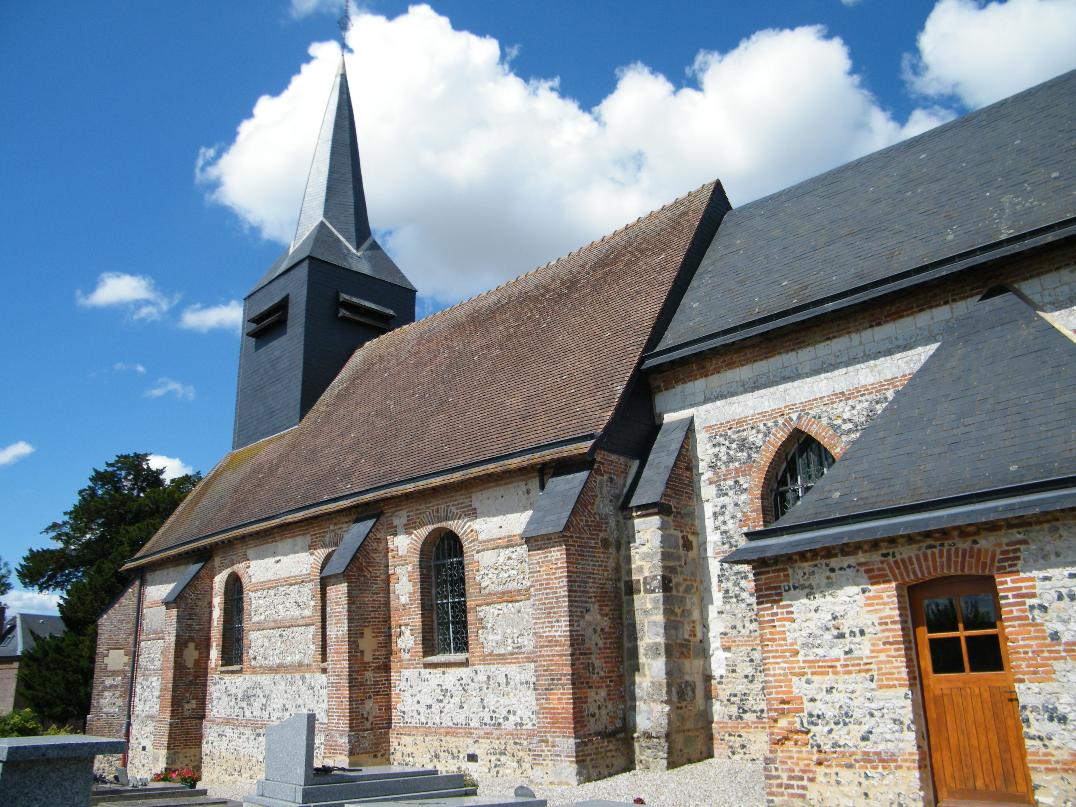 Fesques, Seine-Maritime, France, église (2)